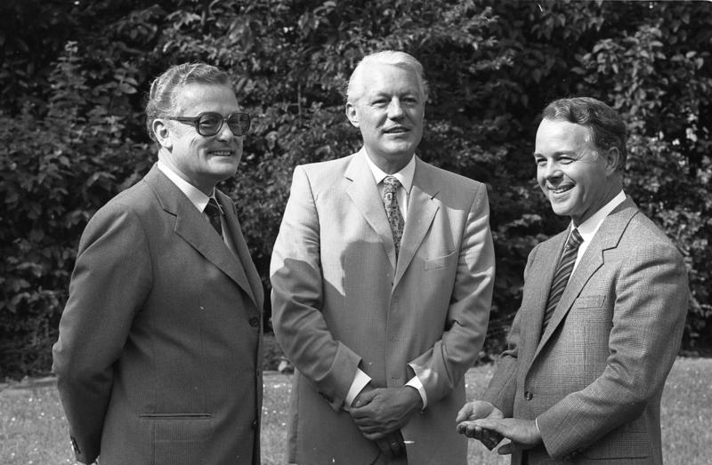 Konferenz der Ministerpräsidenten der CDU/CSU-regierten Länder in der Landesvertretung Niedersachsen, Bonn. Thema: Sparprogramm der Bundesregierung